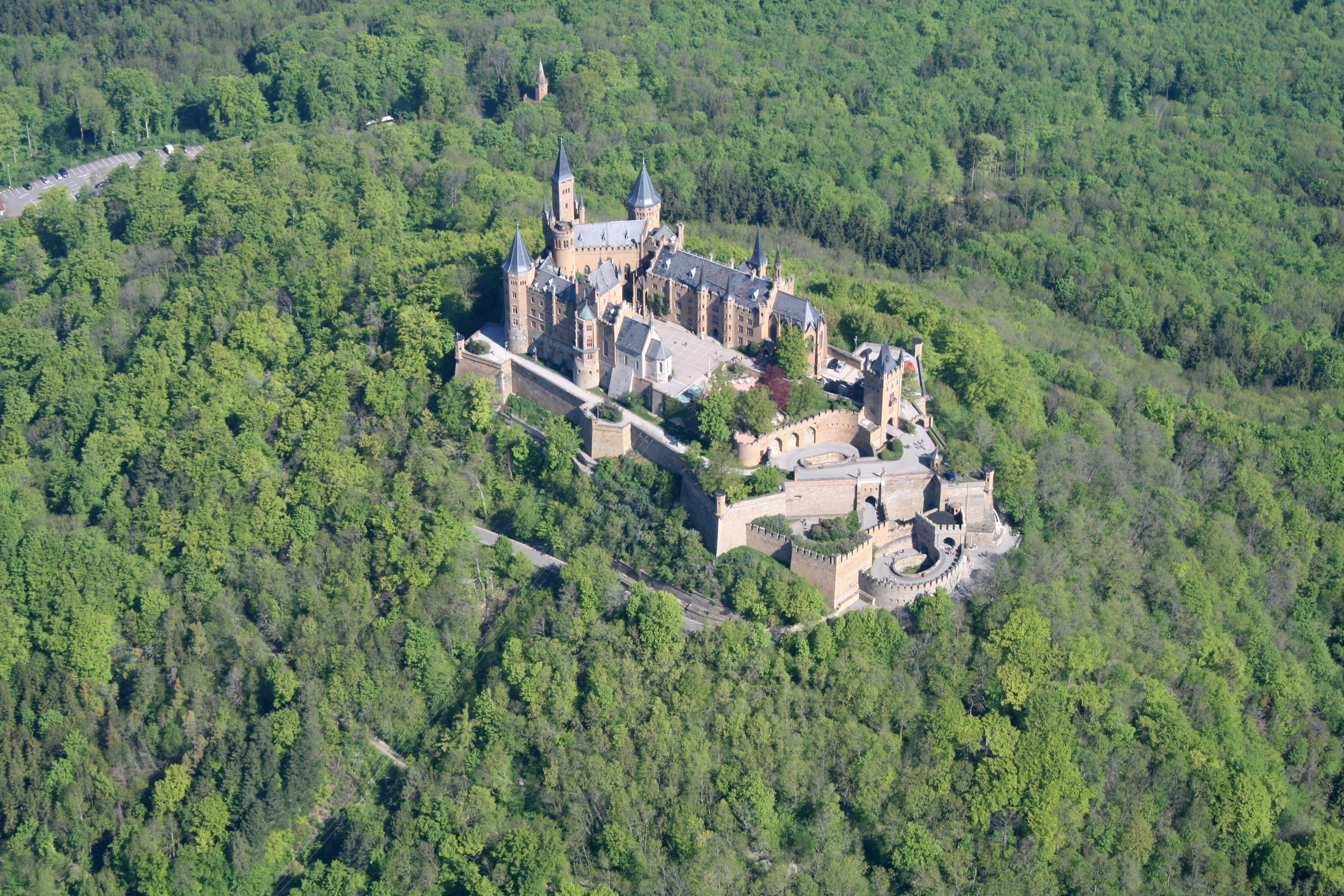 Lutfaufnahme der Burg Hohenzollern im Mai